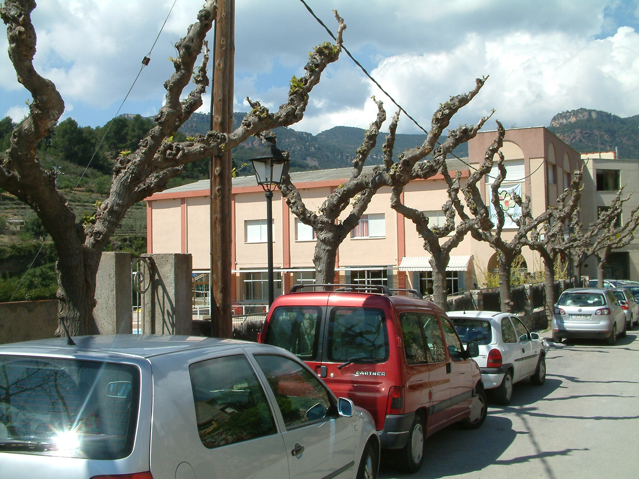 Imatge del Casal de Vilaplana, al Baixa Camp